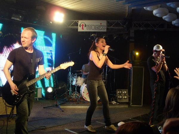 Skyline koncertují v Olomouci v rámci Escapism Tour